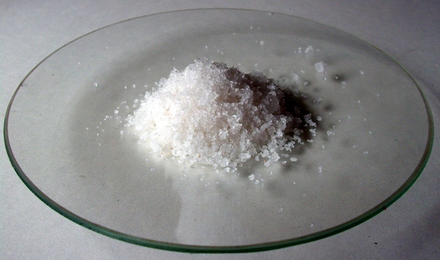 Bi(NO3)3